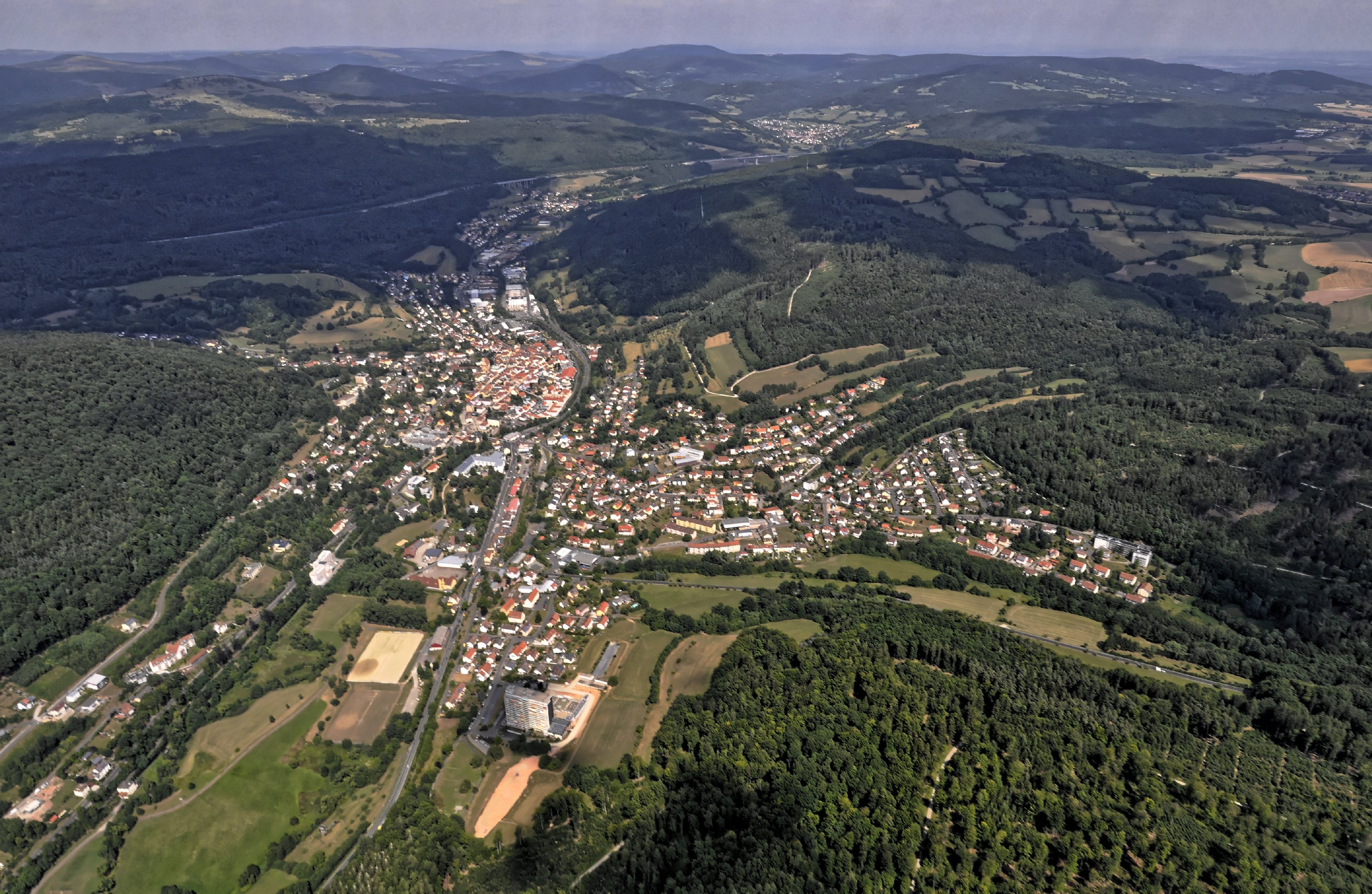 Bilder vom Flug Nordholz-Hammelburg 2015: Bad Brückenau